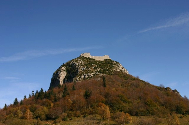 Montsegur, France